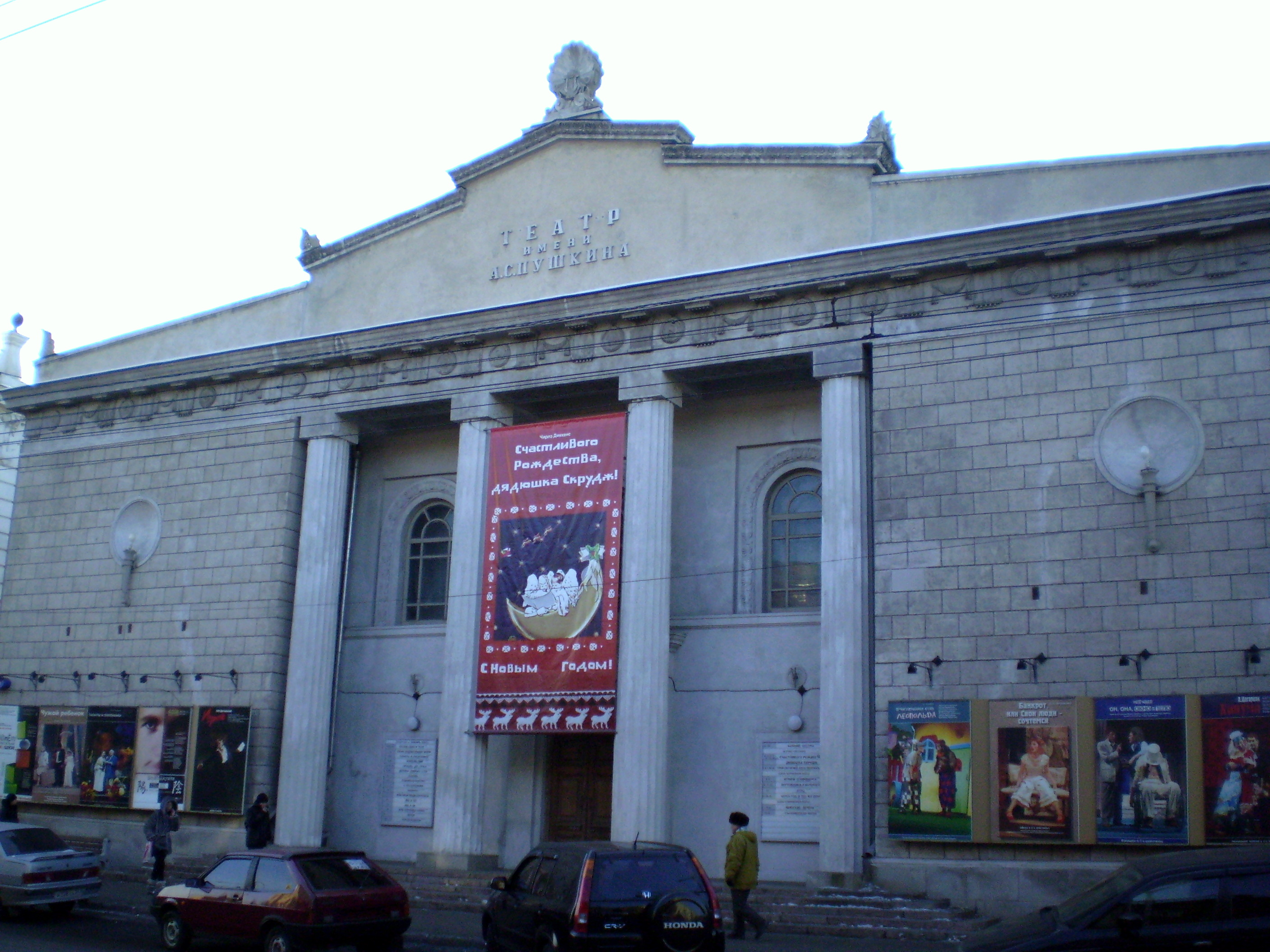 Драматический теарт им. А.С. Пушкина